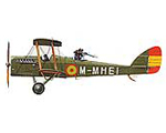 eigene Skizze DH-4 espania